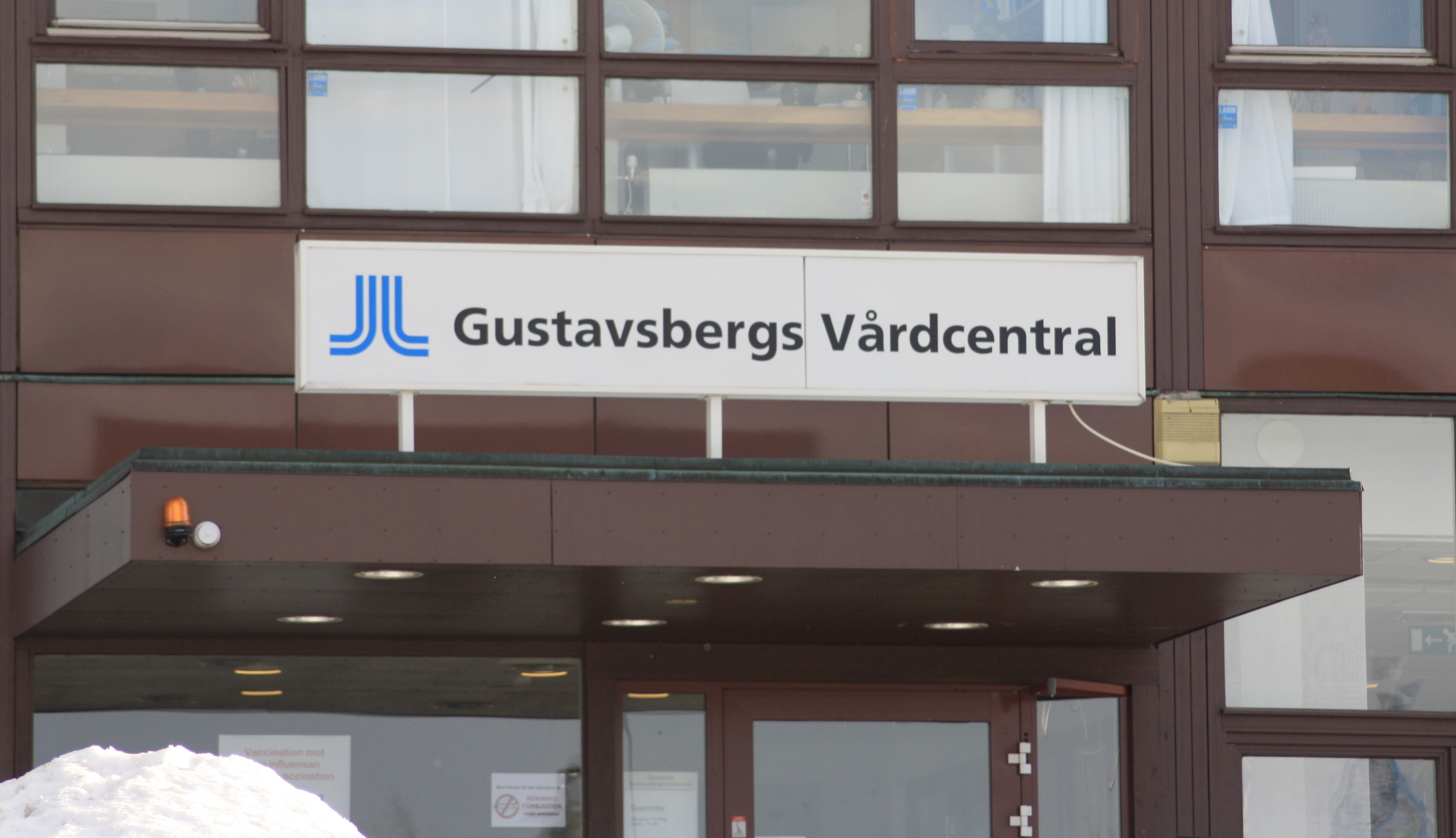 Skylten till Gustavsbergs vårdcentral, Värmdö, Sverige, mars 2010